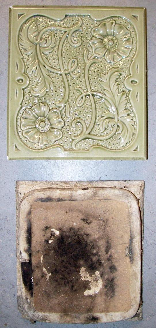 Ofenkacheln typ. Format 215 x 190mm, Dicke 50mm